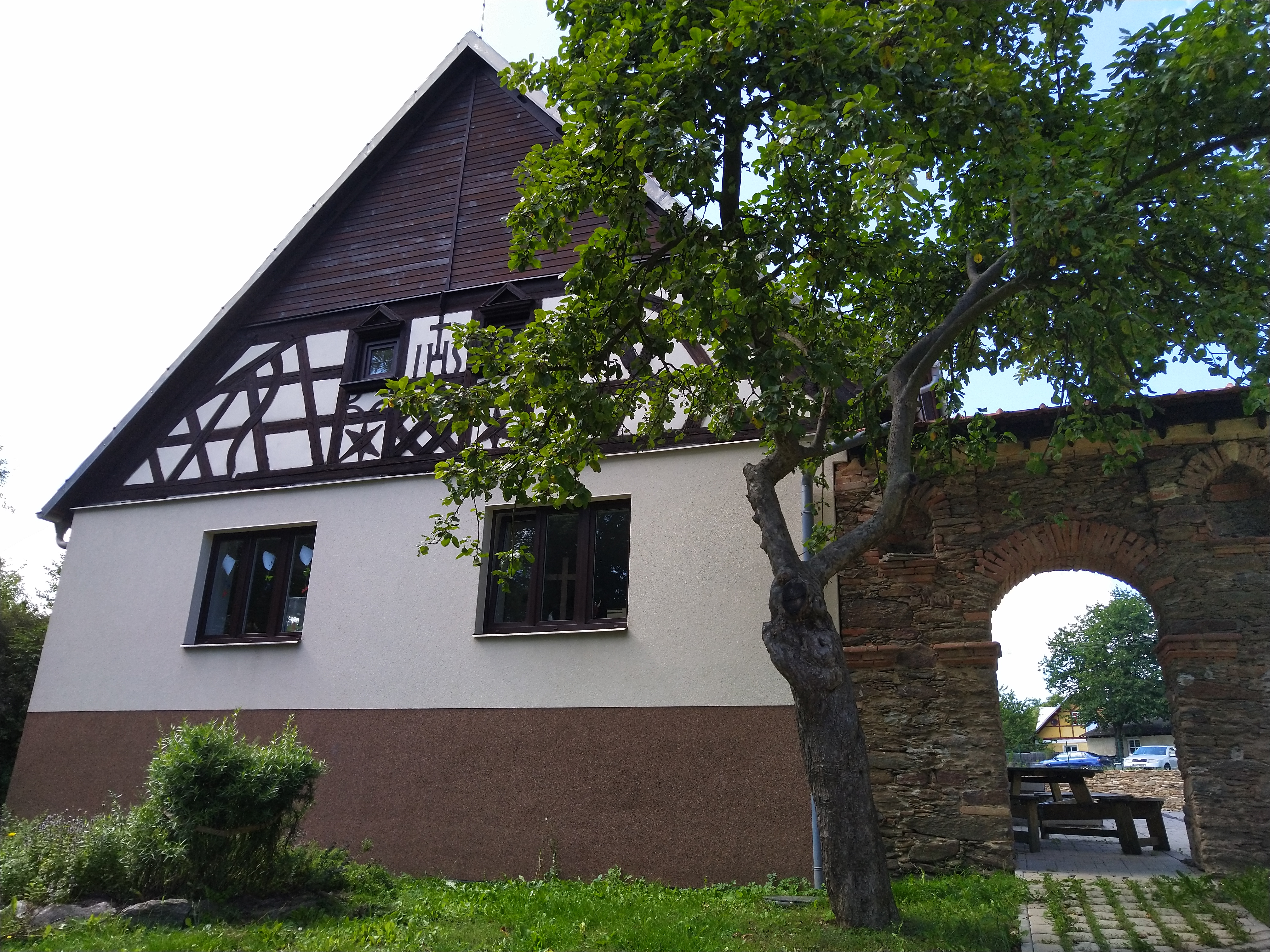 Sídlo Českého západu, Dobrá Voda 52, Toužim.